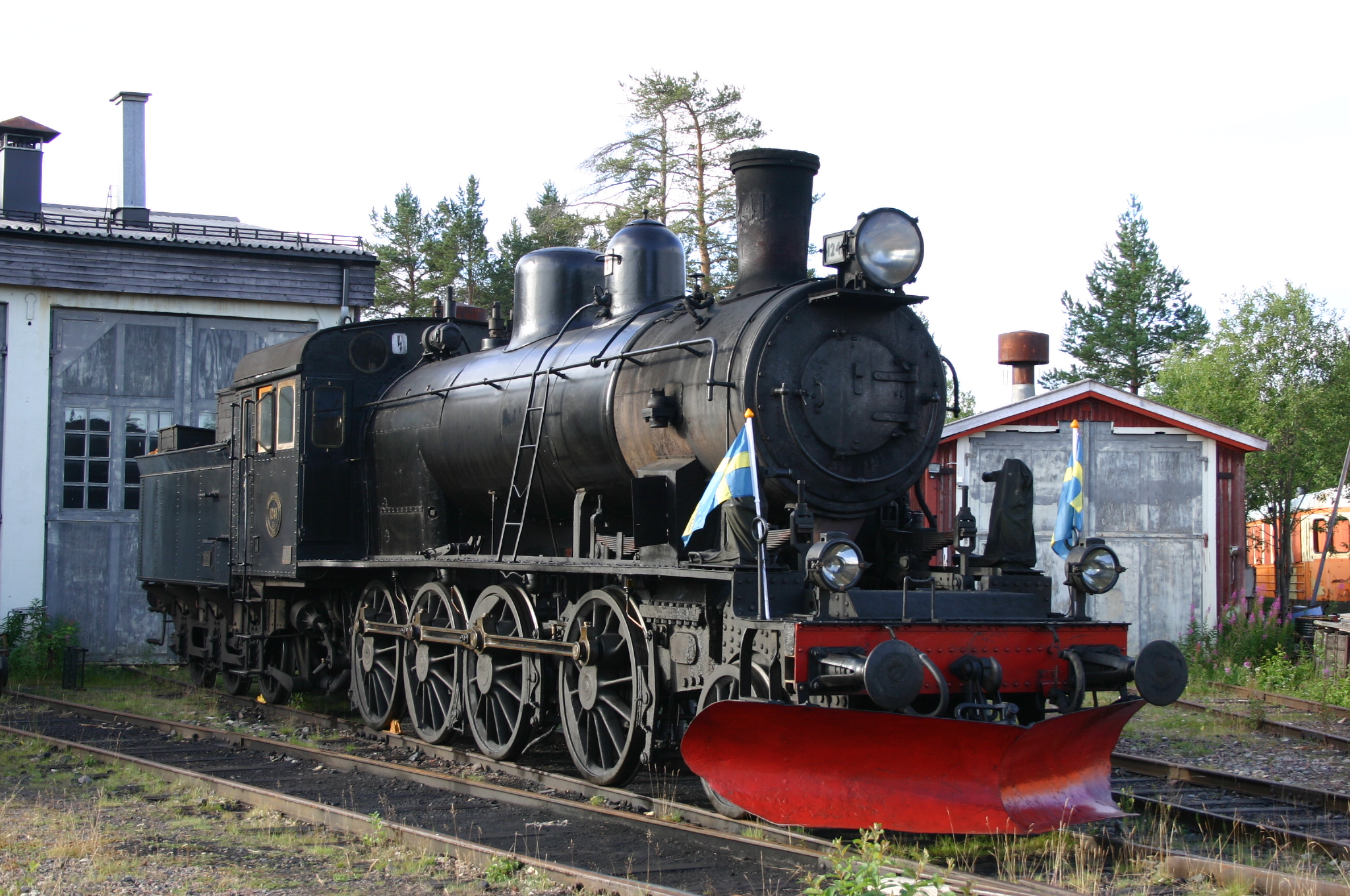 Dampflokomotive E2 1241 Atlas 162/1915 Arvidsjaur 15.08.04